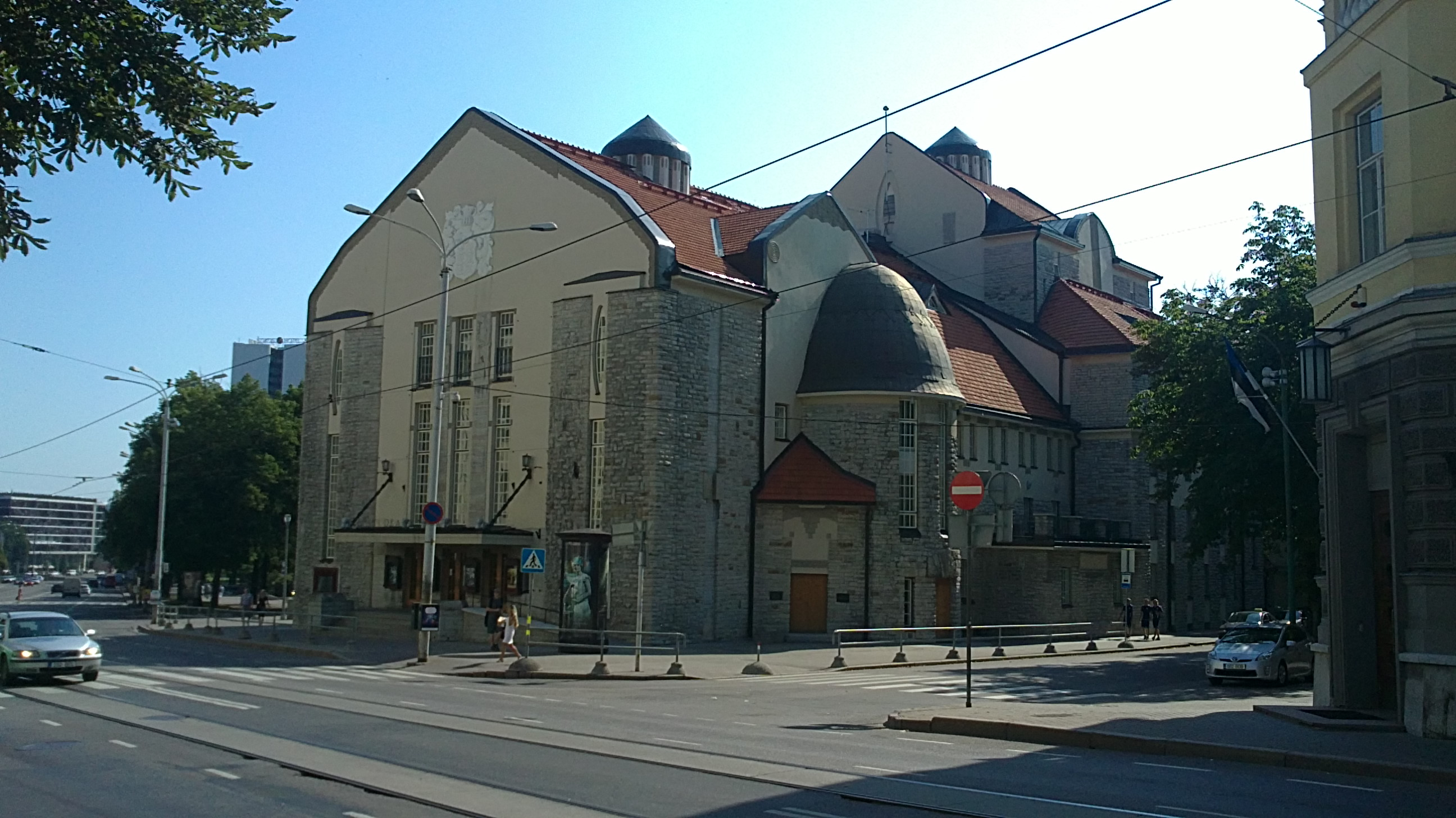 Tallinna kesklinna Pärnu maantee 5 Eesti Draamateatri hoone, vaade Pärnu maanteelt